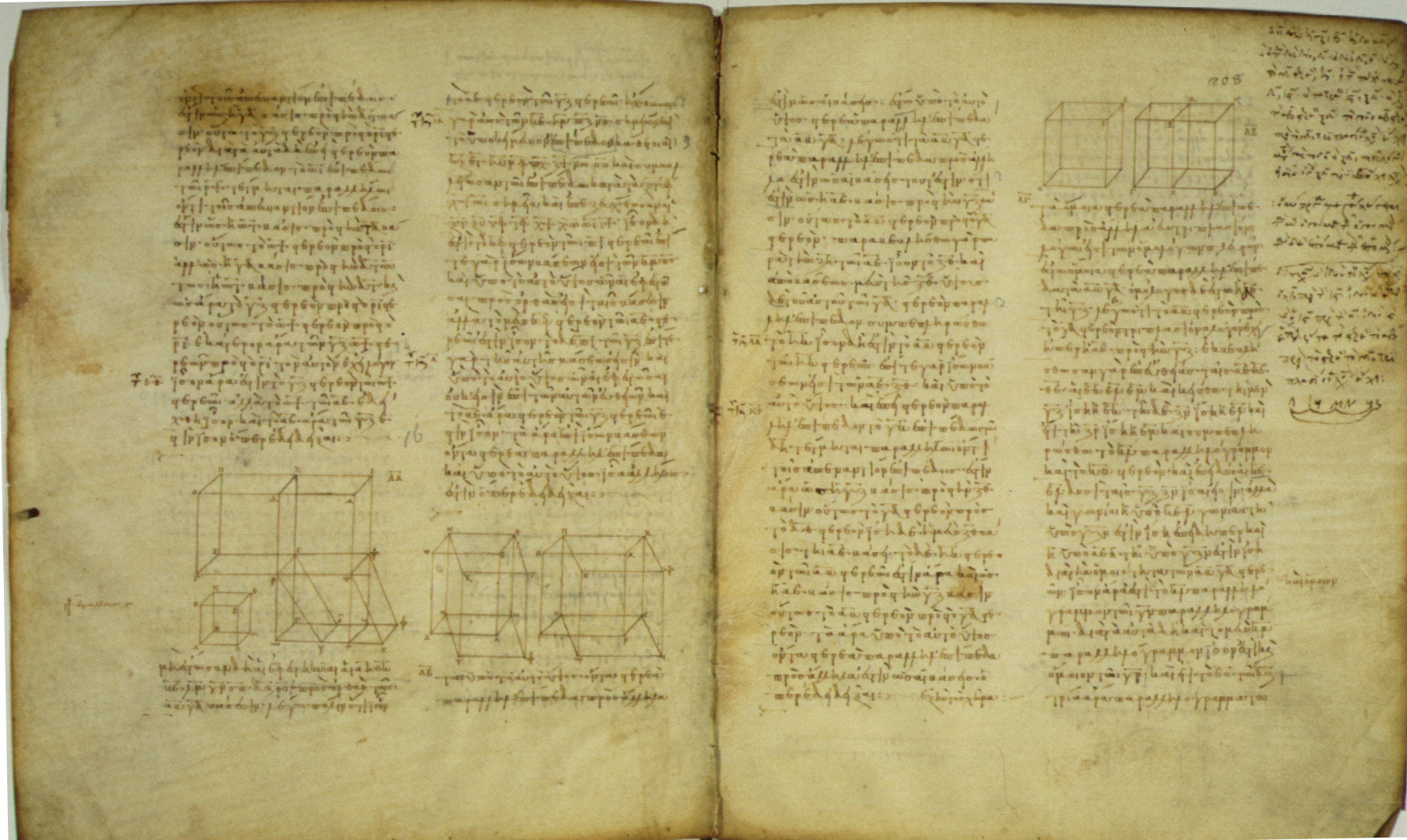 Le prop. 31, 32 e 33 del libro XI di Euclide, che si trova nel vol. 2 del manoscritto, ai fogli 207 verso - 208 recto.